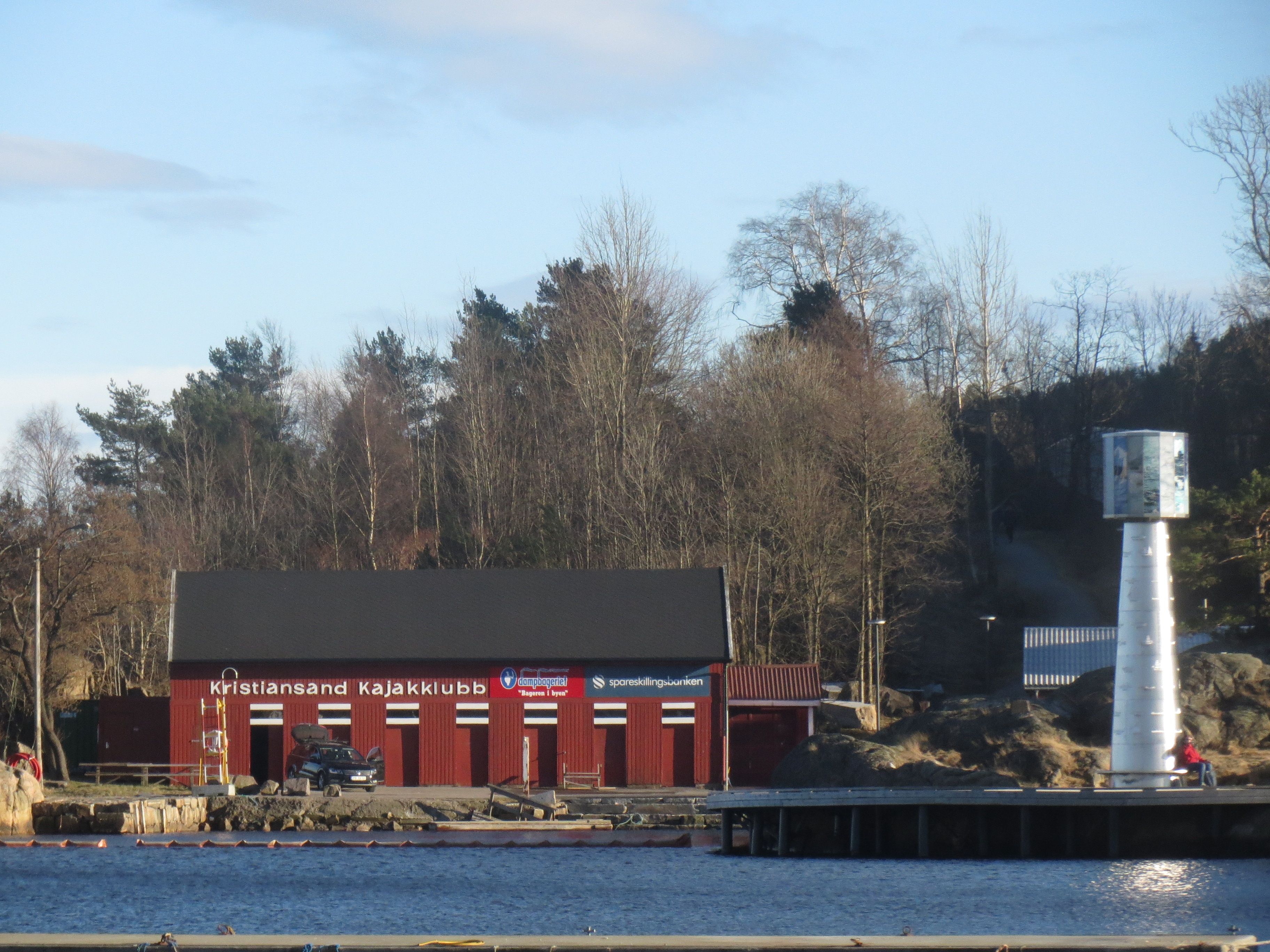 Kristiansand Kajakklubb klubbhus Odderøya